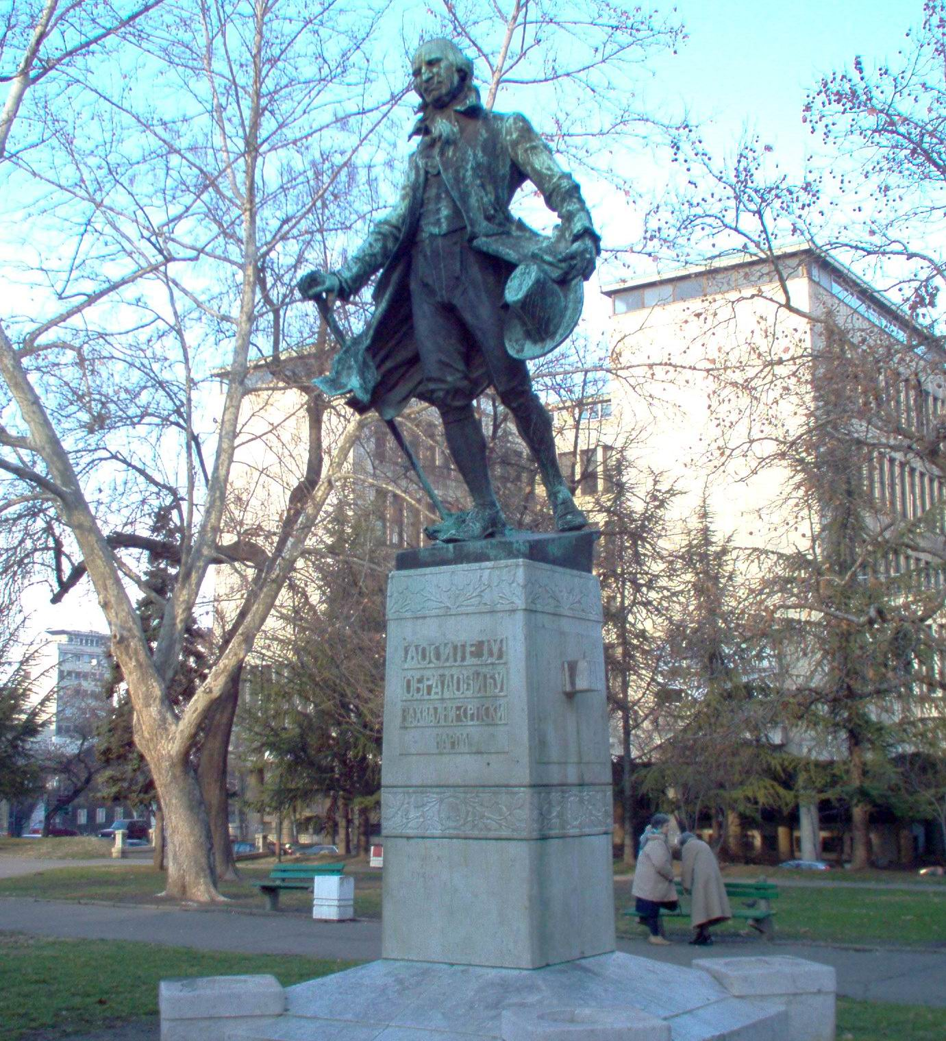 Споменик Доситеју Обрадовићу у студентском парку у Београду